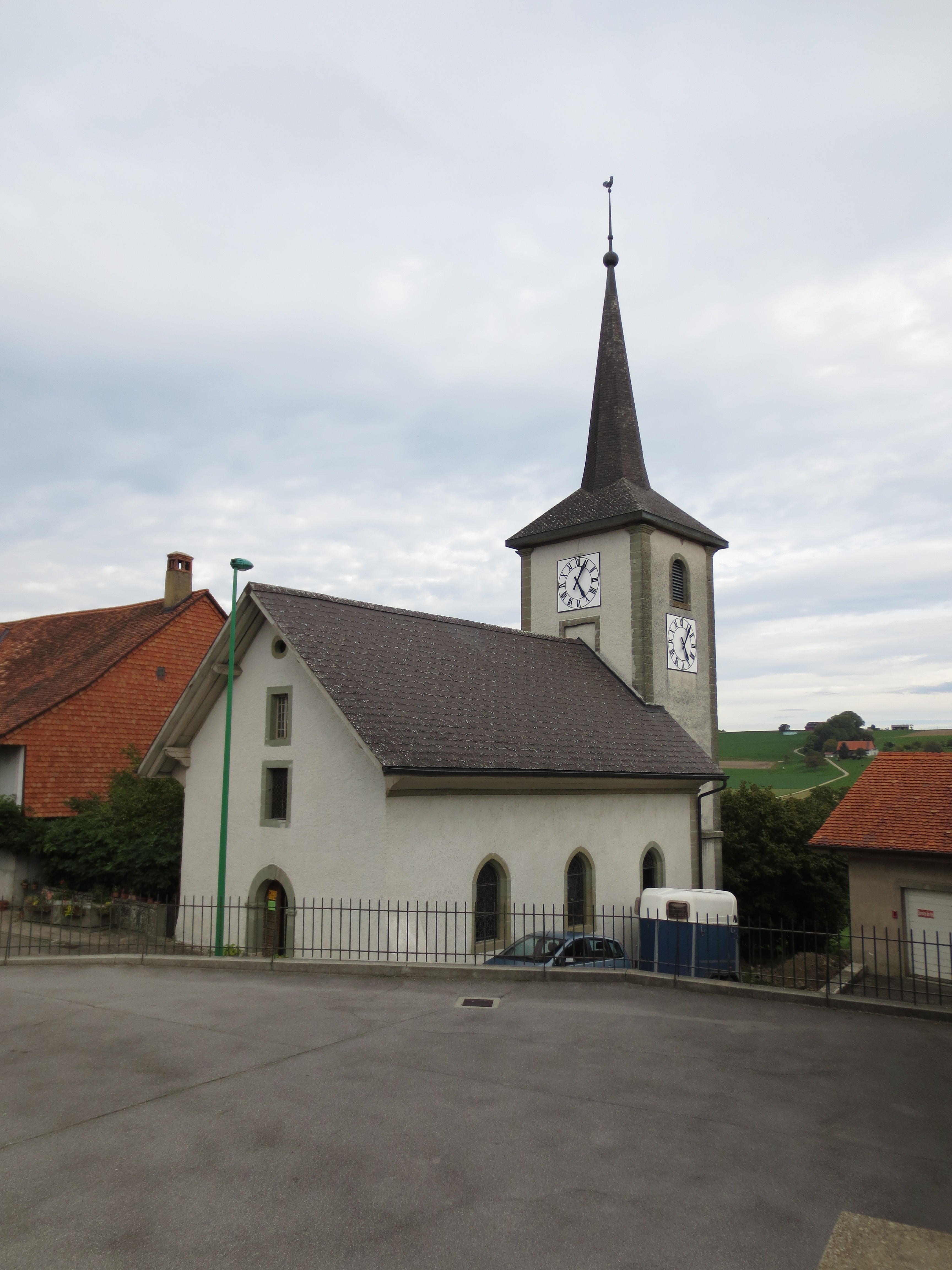 Église de Brenles